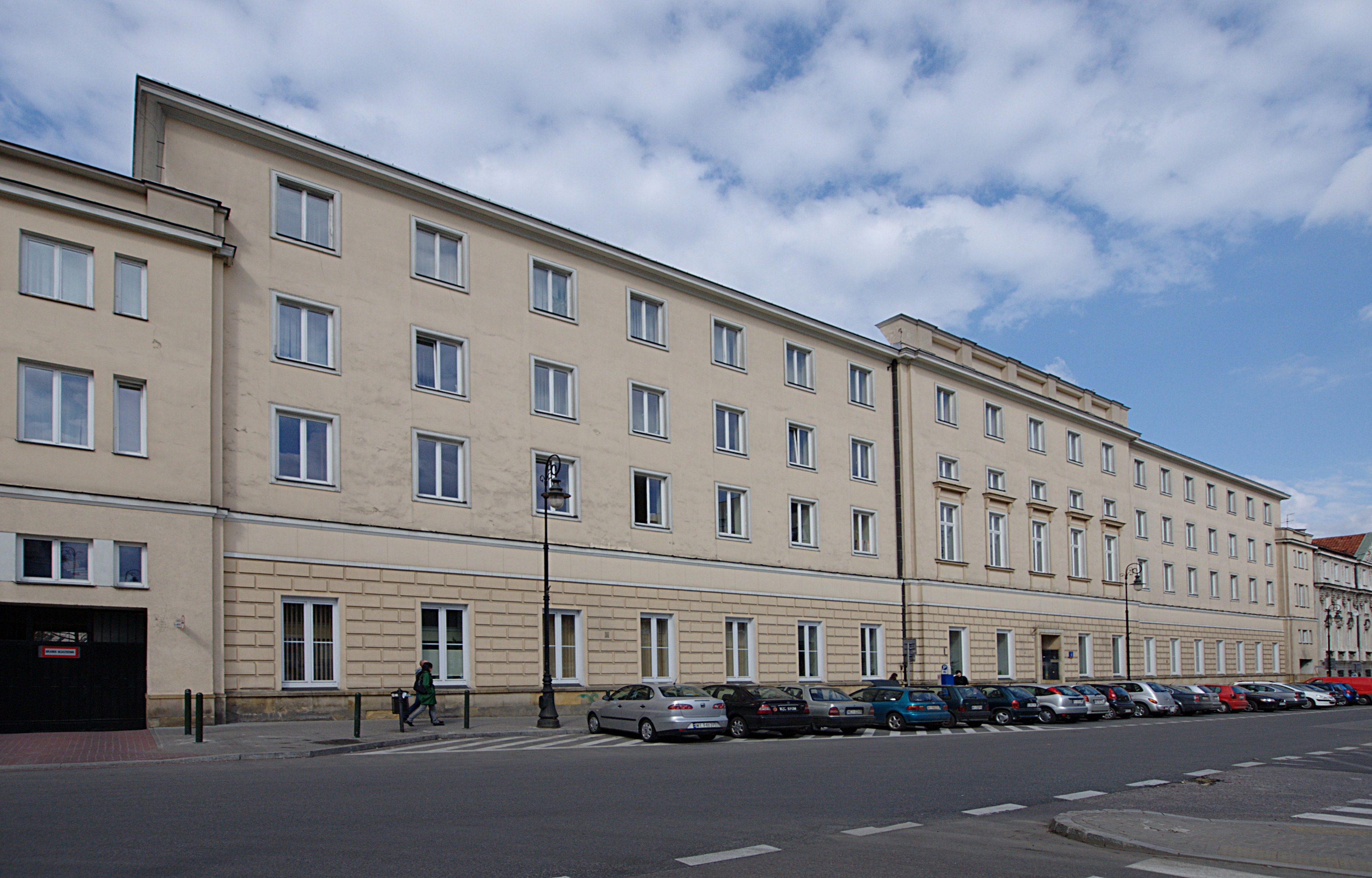 Krajowa Izba Gospodarcza. Ulica Trębacka 4